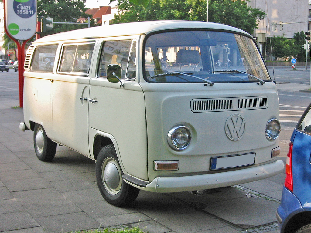 VW Transporter, T2 Zwischenmodell